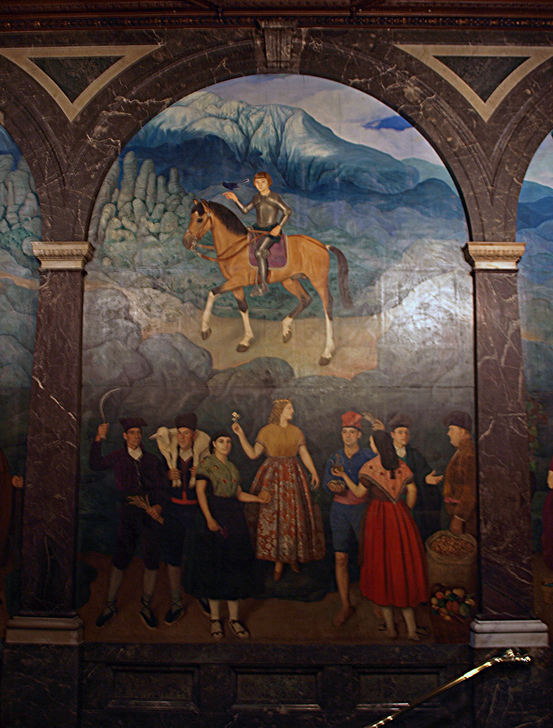 Escala Negre (Ajuntament de Barcelona)